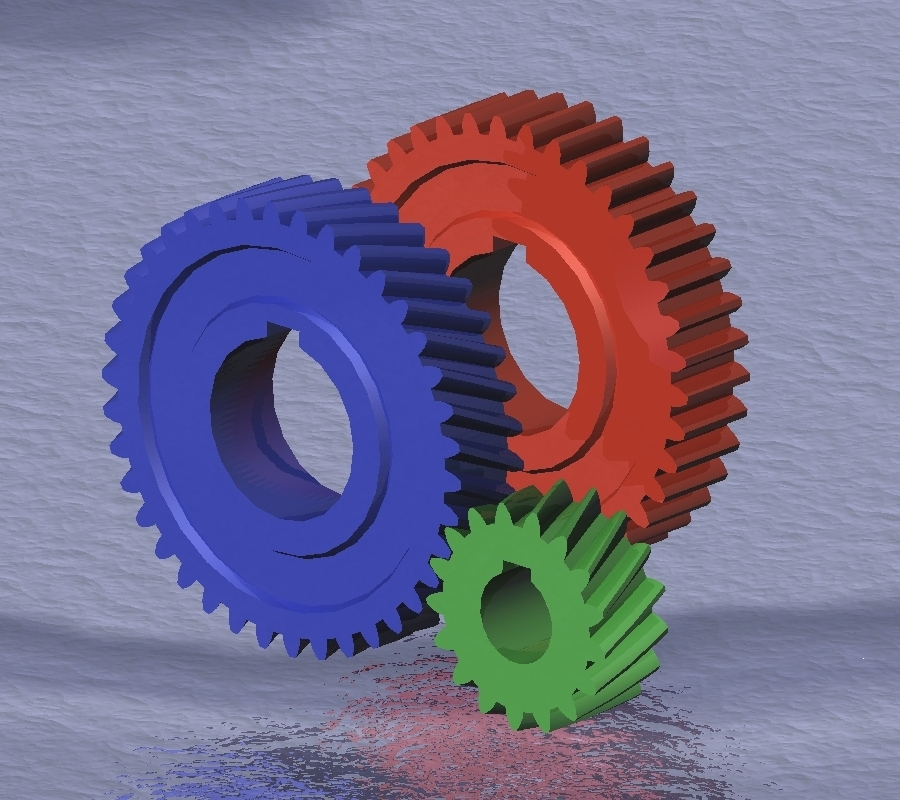 Comparaison des dentures droite (rouge) et hélicoïdale (bleu). Le pignon (vert) a un sens d'hélice inversé pour engrèner avec la roue (bleu). Image de synthèse réalisée avec SolidWorks ruizo